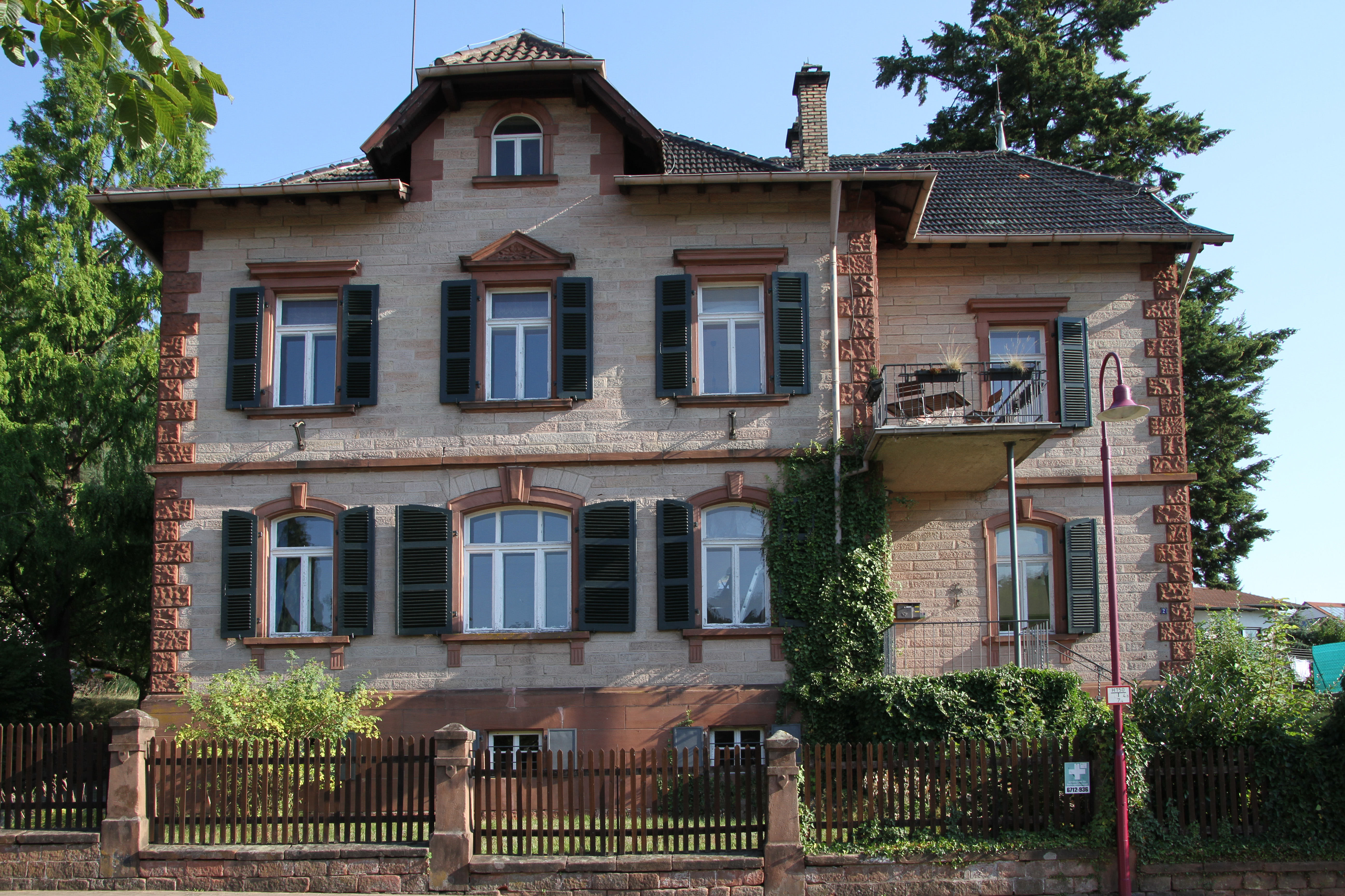 Merzalben, Höhstraße 2; Forsthaus, stattlicher historisierender Krüppelwalmdachbau, um 1900.